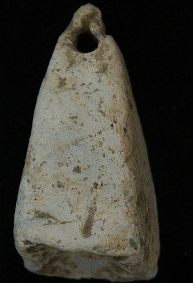 Poids peson à suspension époque médiévale.